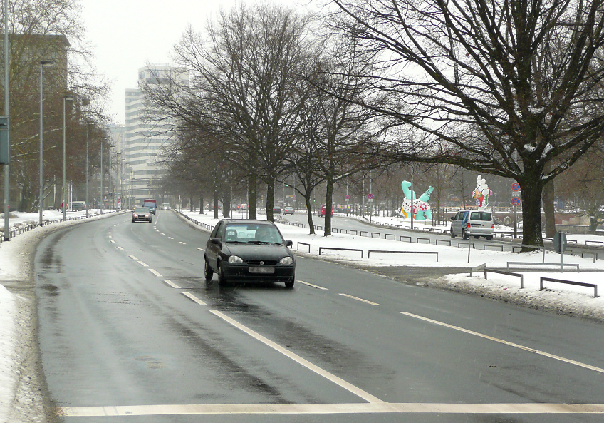 Leibnizufer